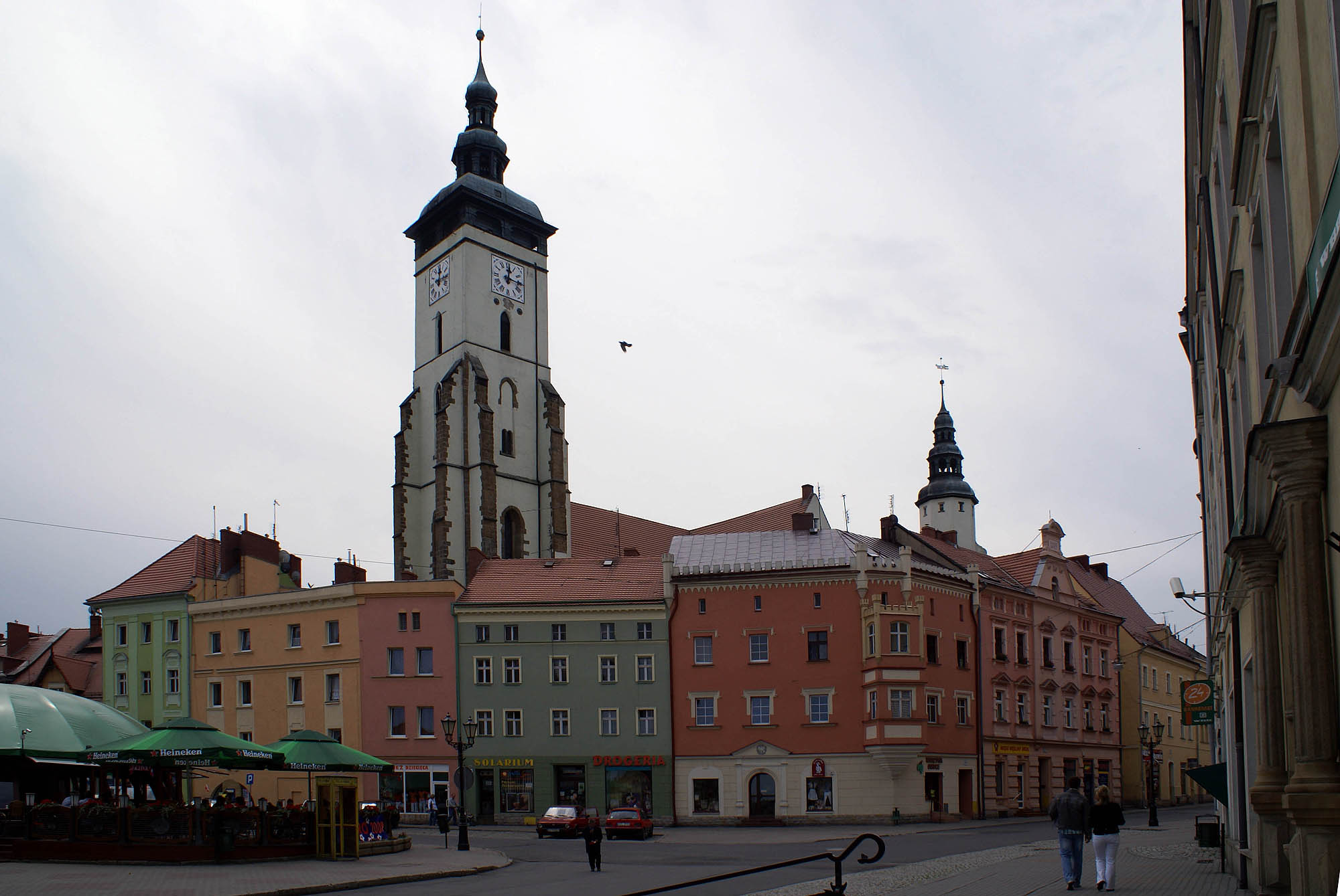 Złotoryja, Stare Miasto